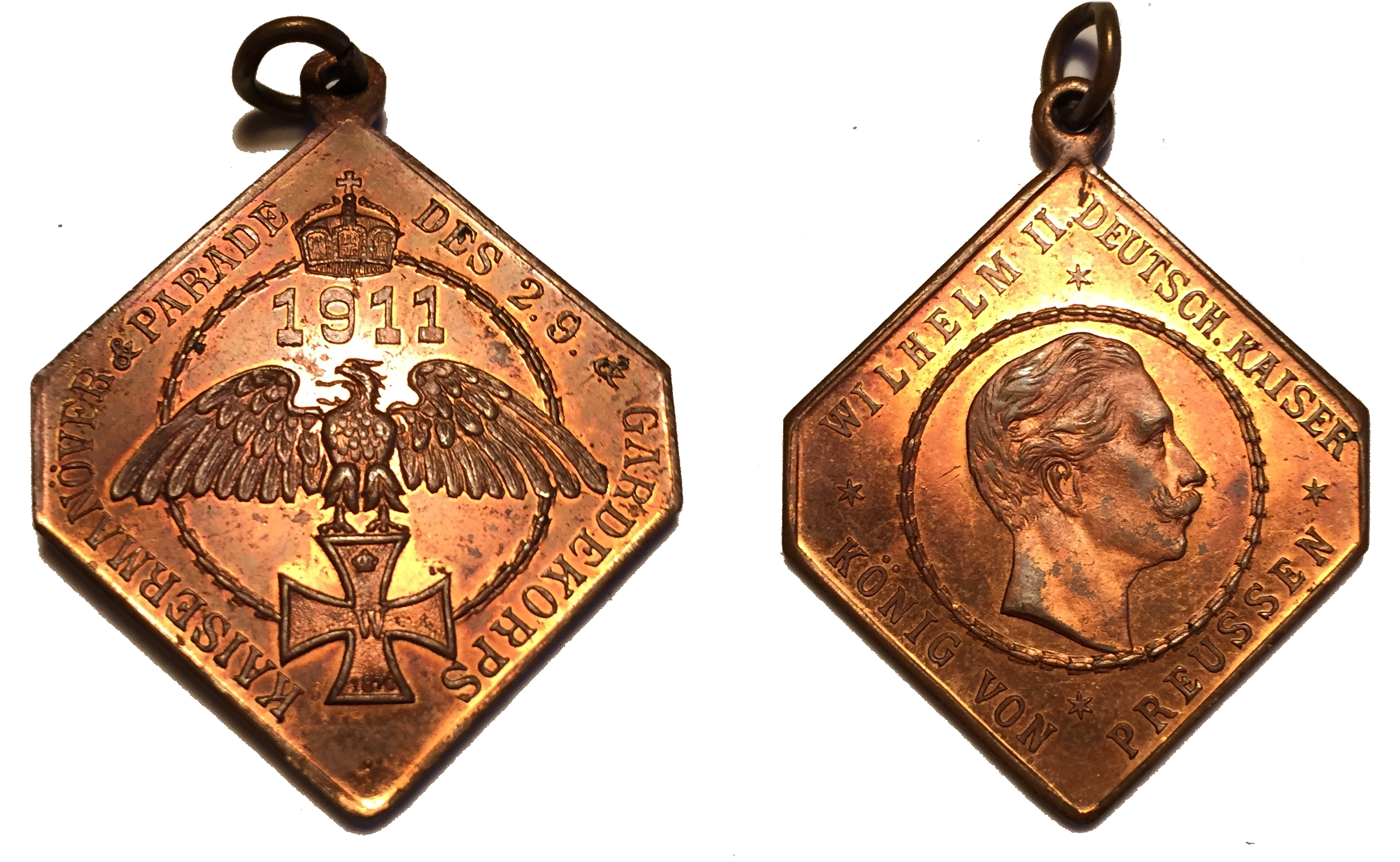 Medaille anläßlich des Kaisermanövers 1911